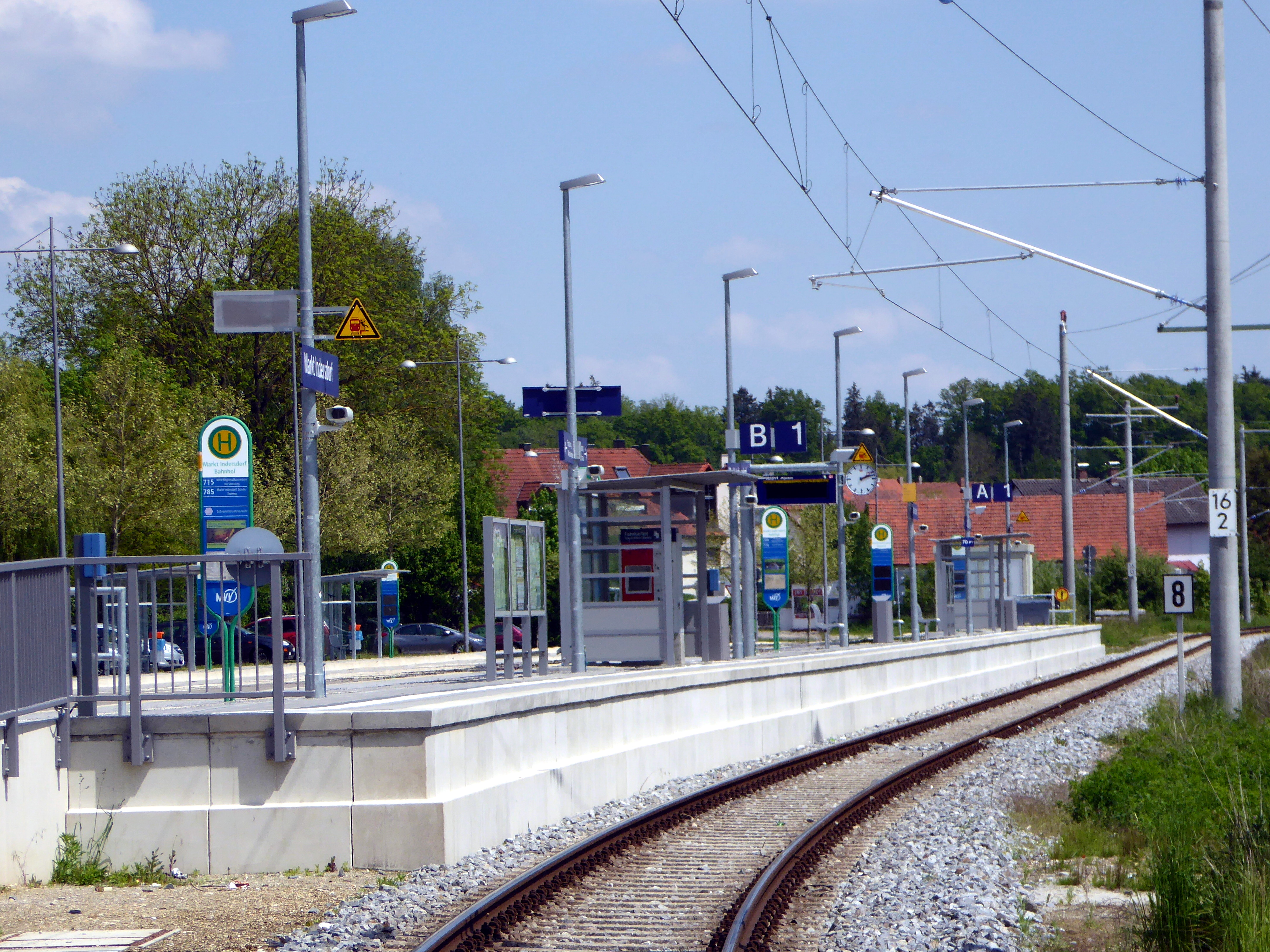 Seit dem Umbau 2014 verfügt der Bahnhof Markt Indersdorf nur noch über ein Gleis, dafür halten Busse gleich auf der anderen Seite des Bahnsteigs.